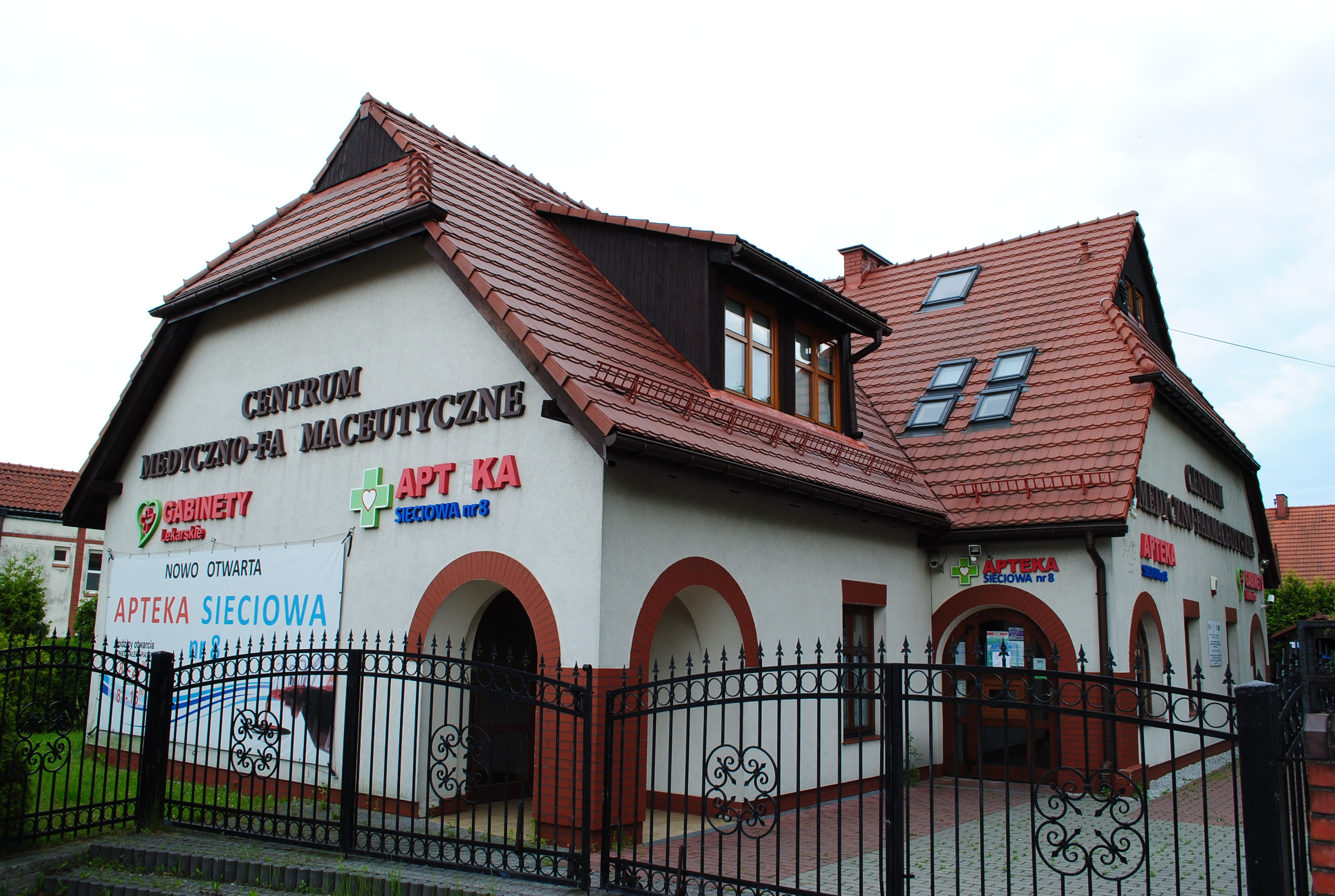 Katowice-Giszowiec. Ulica Przyjazna. Przychodnia